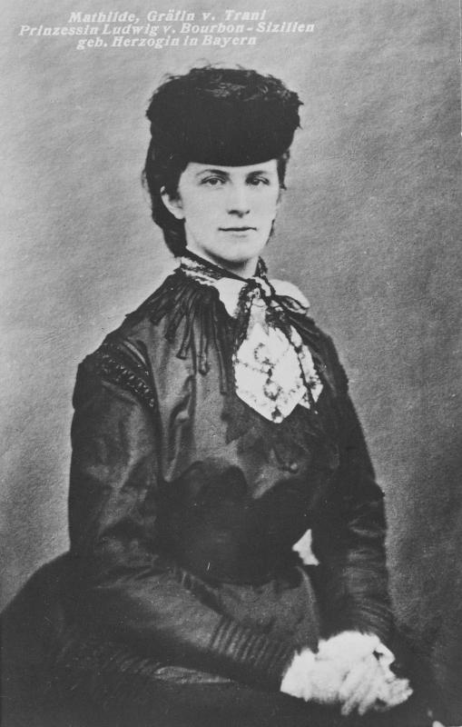 Mathilde, Grafin von Trani, Prinzessin Ludwig von Bourbon-Sizilien, geb. Herzogin in Bayern